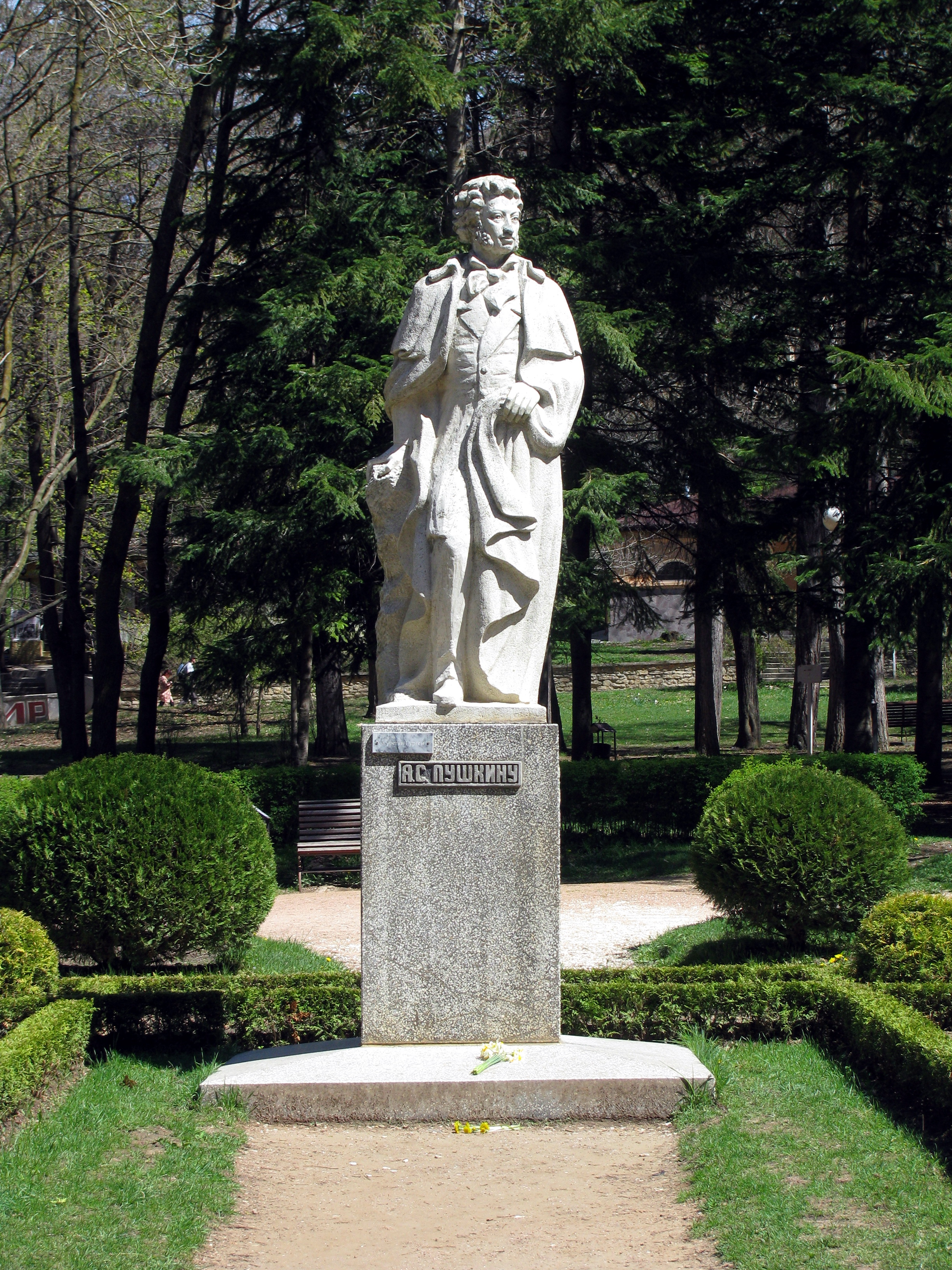 Памятник Пушкину А.С.: курортный парк, Кисловодск, Ставропольский край